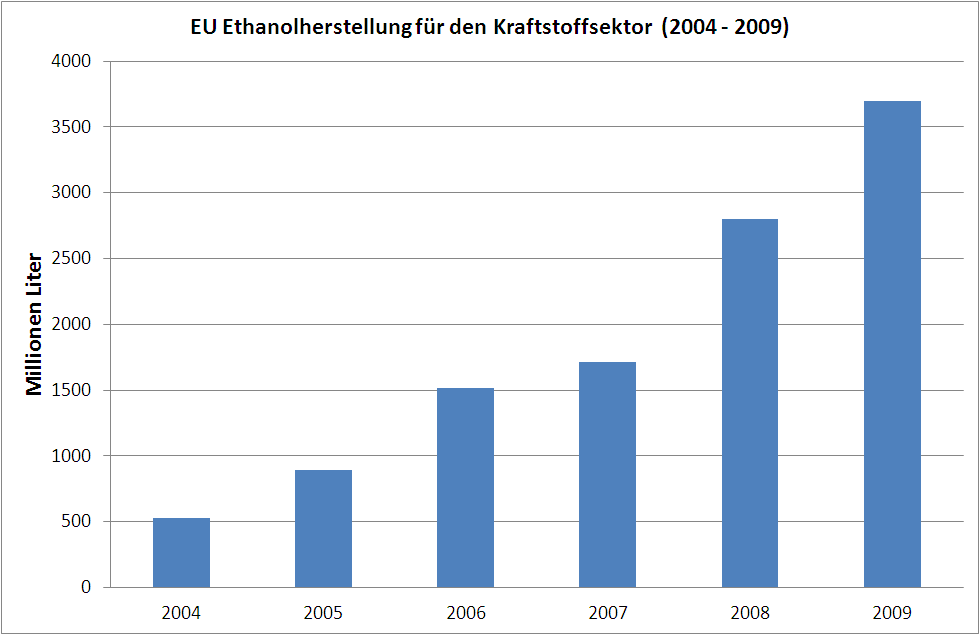 Entwicklung der Ethanolherstellung für den Kraftstoffsektor